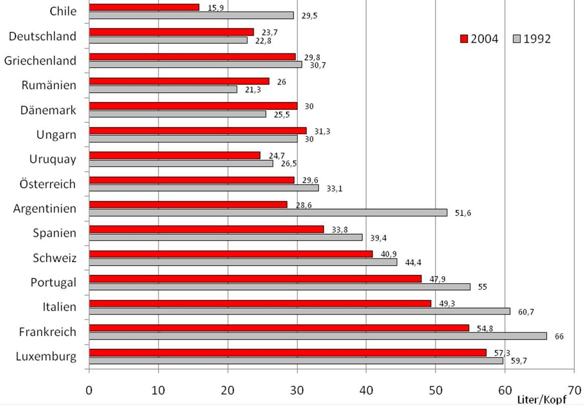 Abb. zeigt die Veränderung des Pro Kopf Verbrauches an Wein zwischen den Jahren 1992 und 2004, Quelle: OIV Bericht 2004